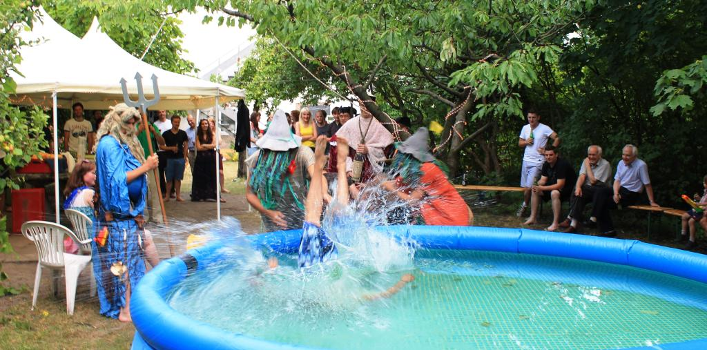 Taufe von jungen Schiffbaustudenten, die von der Schiffbauervereinigung Latte in berlin durchgeführt wurde